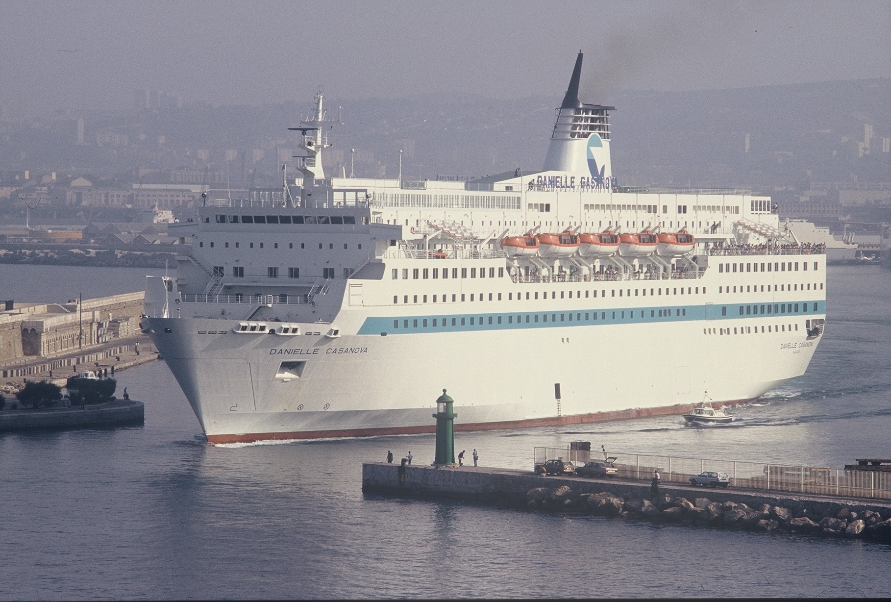 Le Danielle Casanova sortant du port de Marseille.